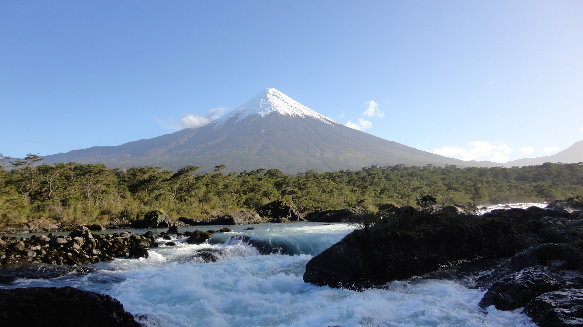 Los Saltos del Río Petrohue, son el desague del Lago Todos los Santos.